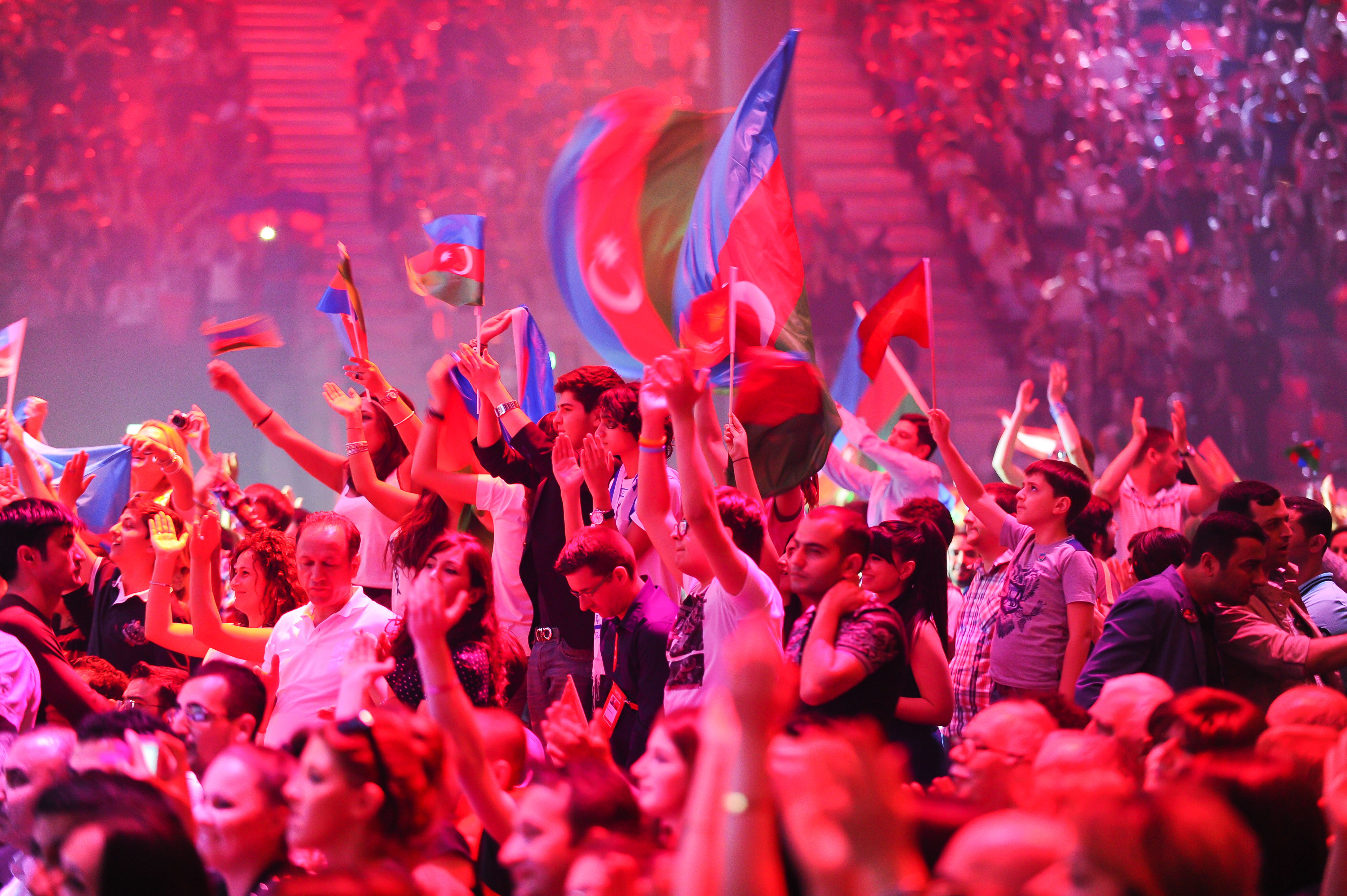 Болельщики в Baku Crystal Hall